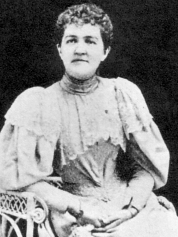 Robertine Barry , née le 26 février 1863 à L'Isle-Verte, morte le 7 janvier 1910 à Montréal, Canada. Une des premières femmes journalistes québécoises.